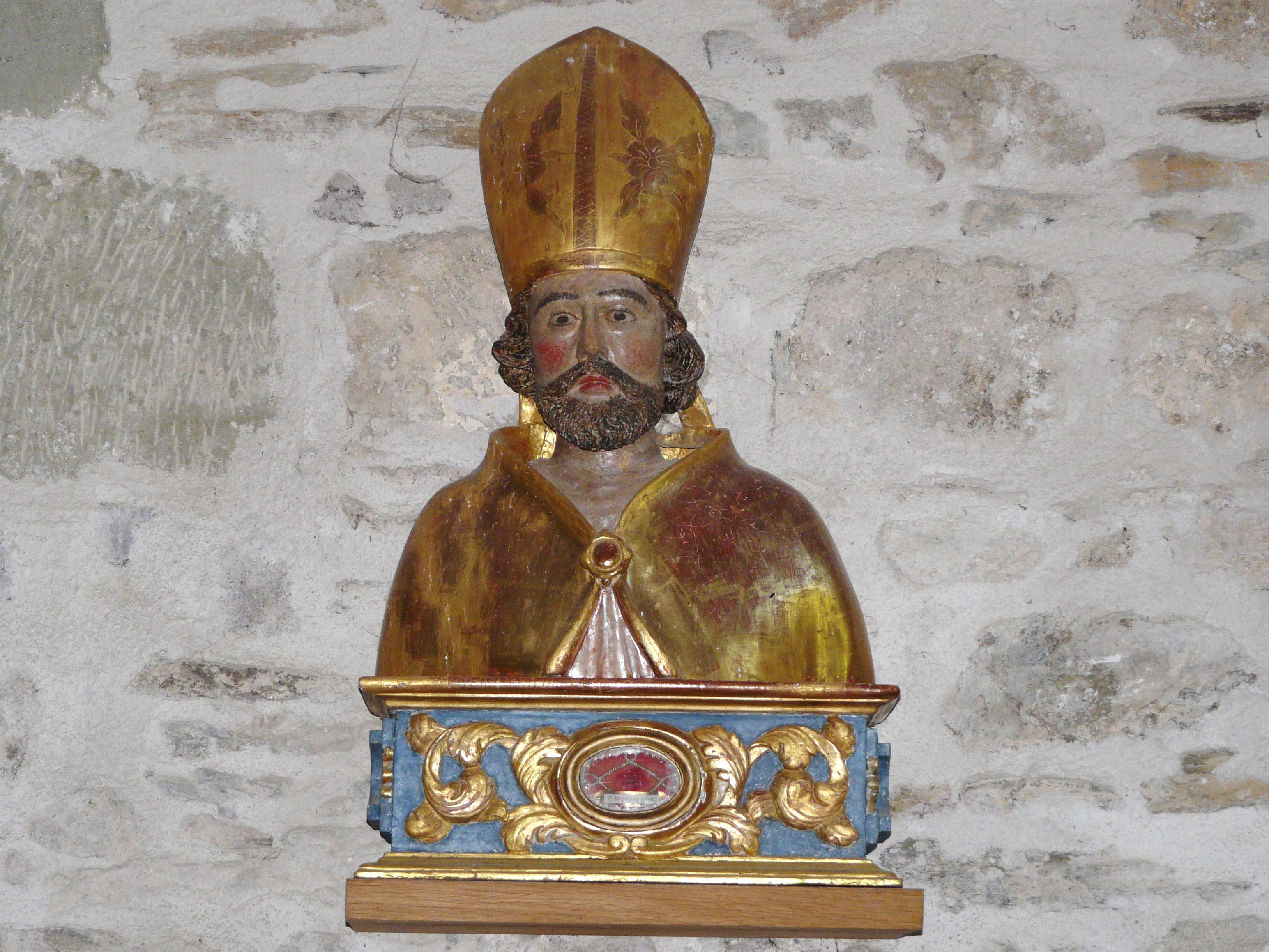 Buste-reliquaire de saint Étienne d'Obazine, église d'Orgnac-sur-Vézère, Corrèze, France.